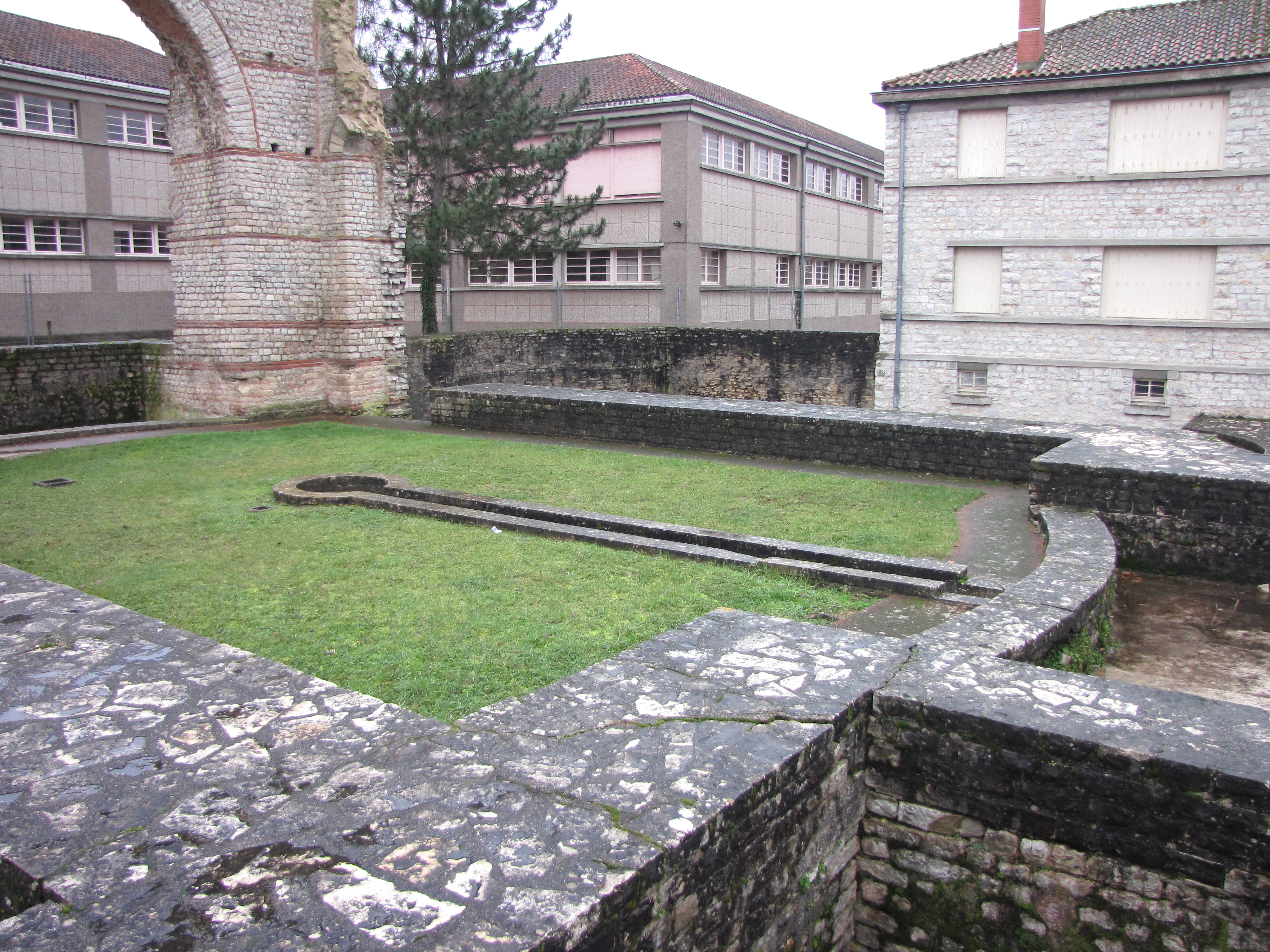 Ruines des thermes de Divona Cadurcorum, Cahors